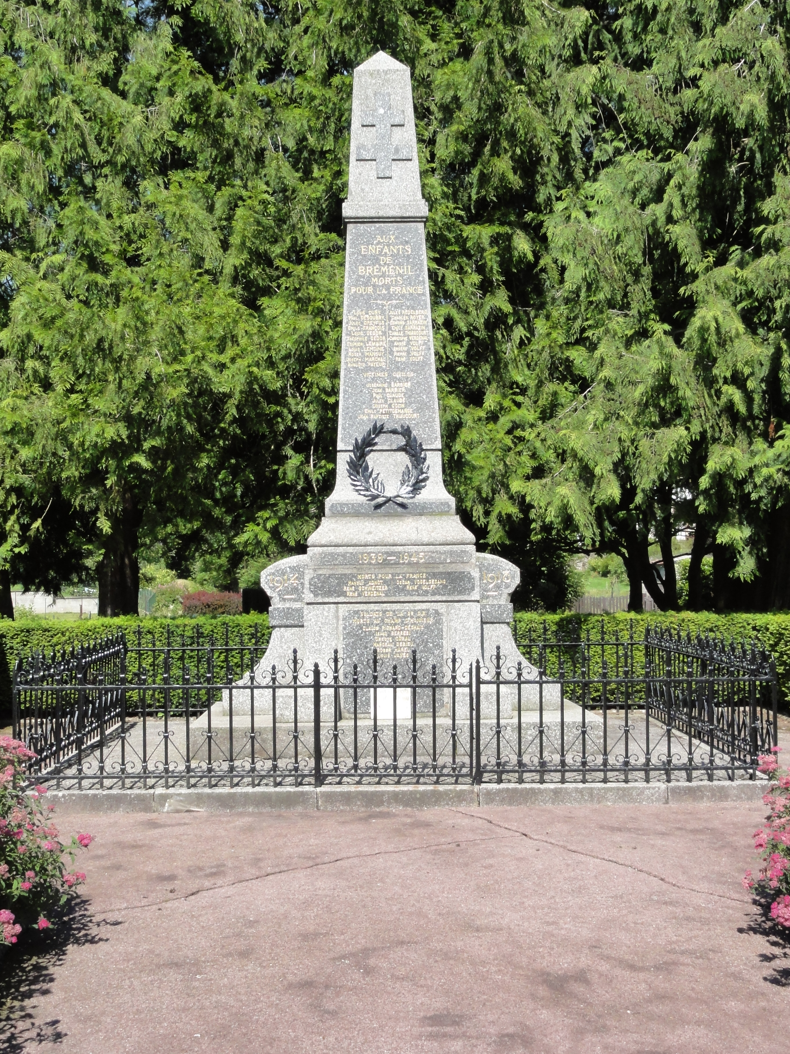 Bréménil (M-et-M) monument aux morts